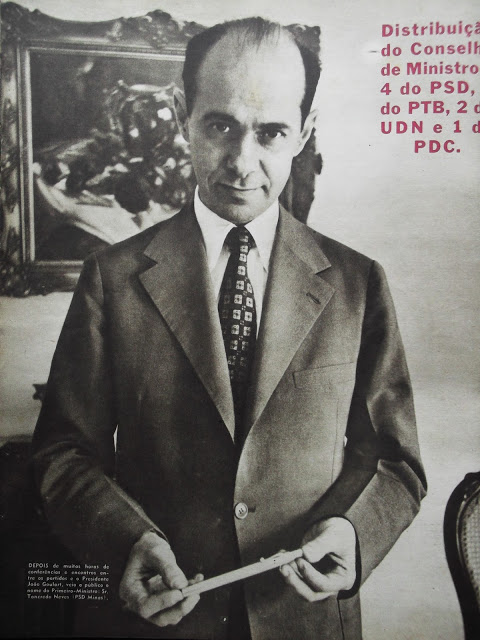 Tancredo Neves como Primeiro Ministro durante a experiência Parlamentarista no governo Jango.